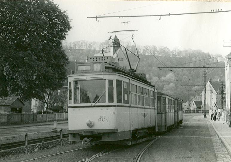 MAN-Einrichtungswagen der Plauenschen Grundbahn bei der Endhaltestelle Freital-Cossmannsdorf